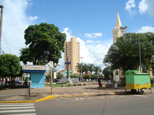 Praça da igreja matriz de Rancharia/SP e um dos dois edifícios da cidade.